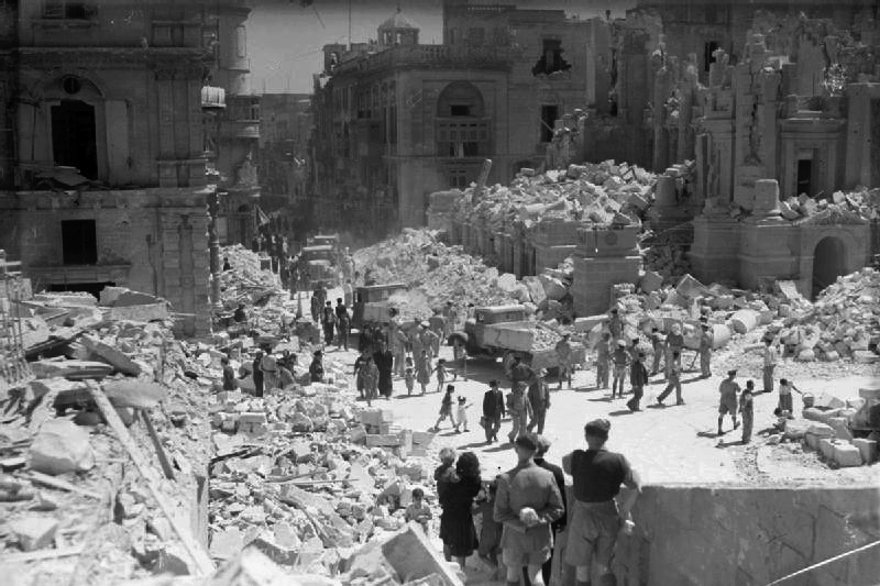 A heavily bomb-damaged street in Valletta, Malta. This street is Kingsway, the principle street in Valetta. Service personnel and civilians are present clearing up the debris.